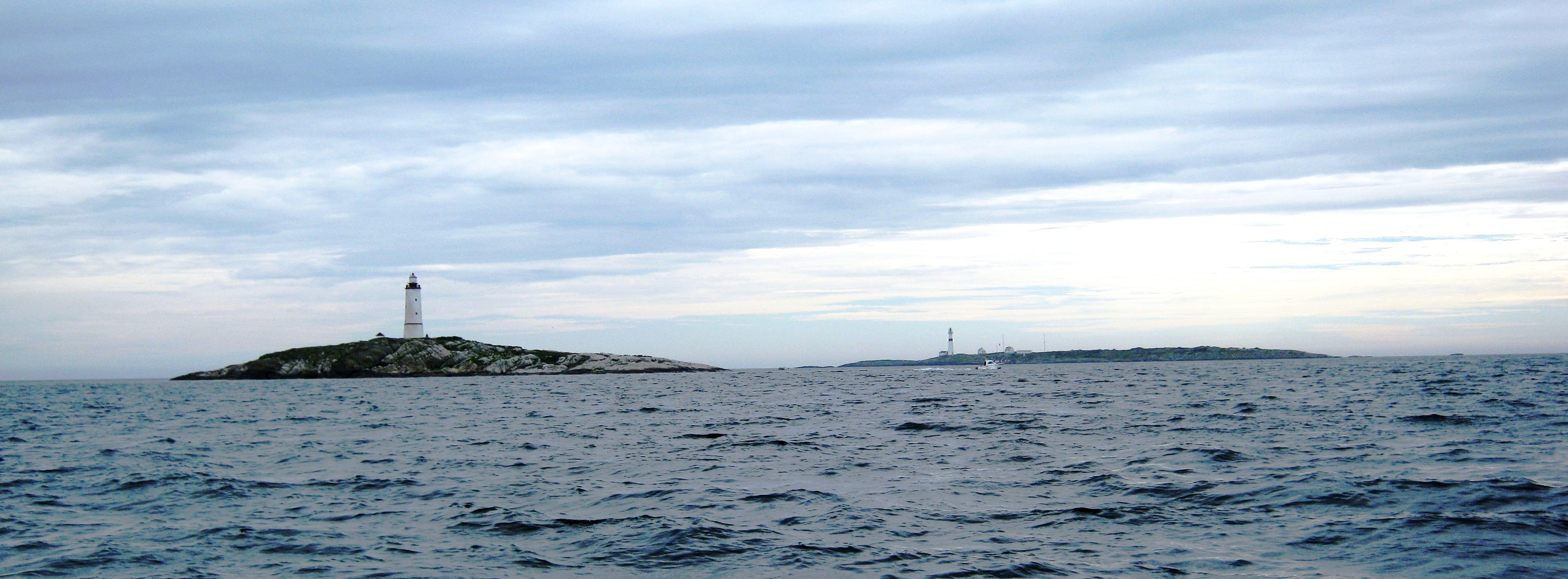 Store og Lille Torungene, Arendal, Norge